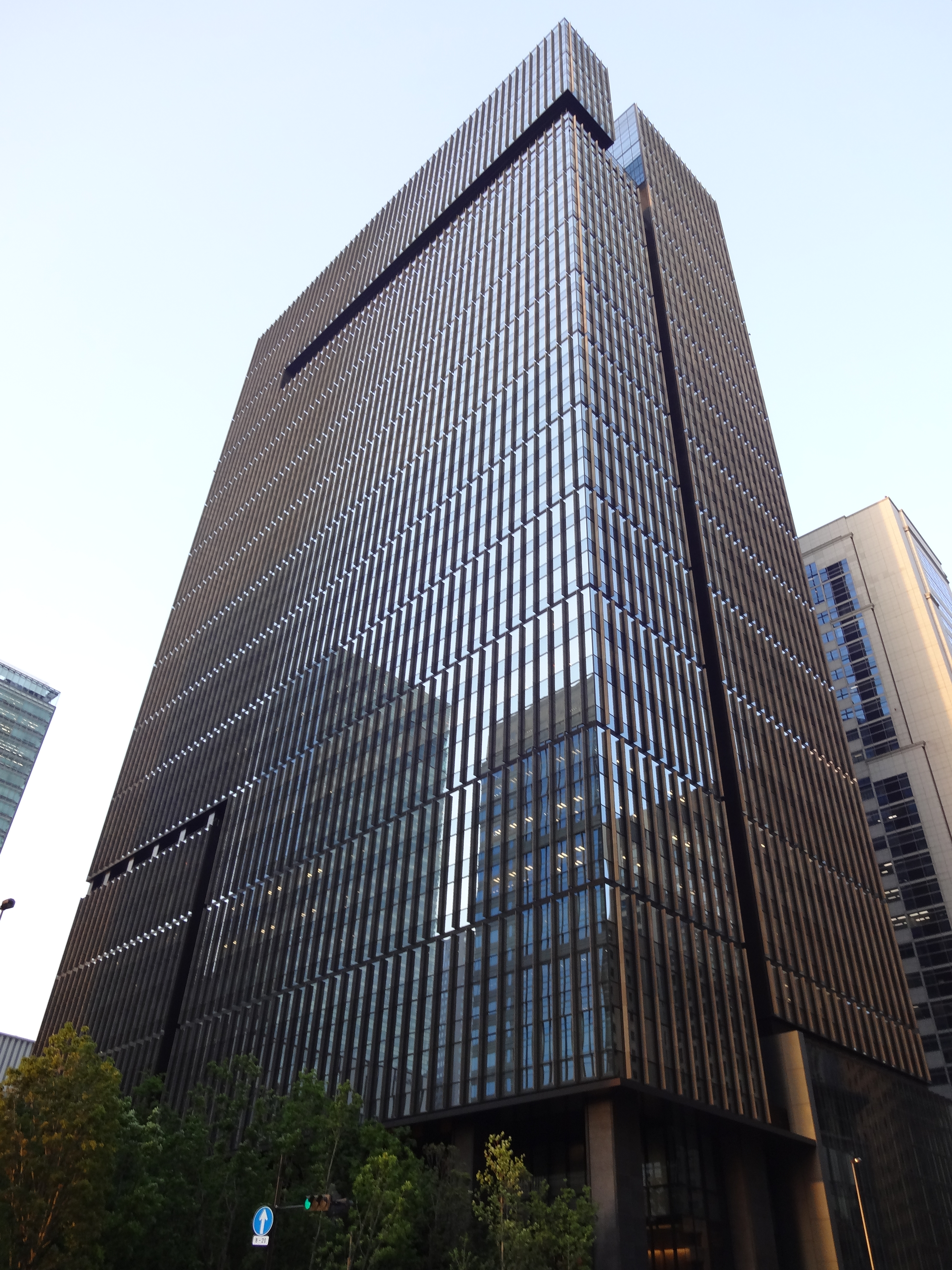 大手町タワーの外観。